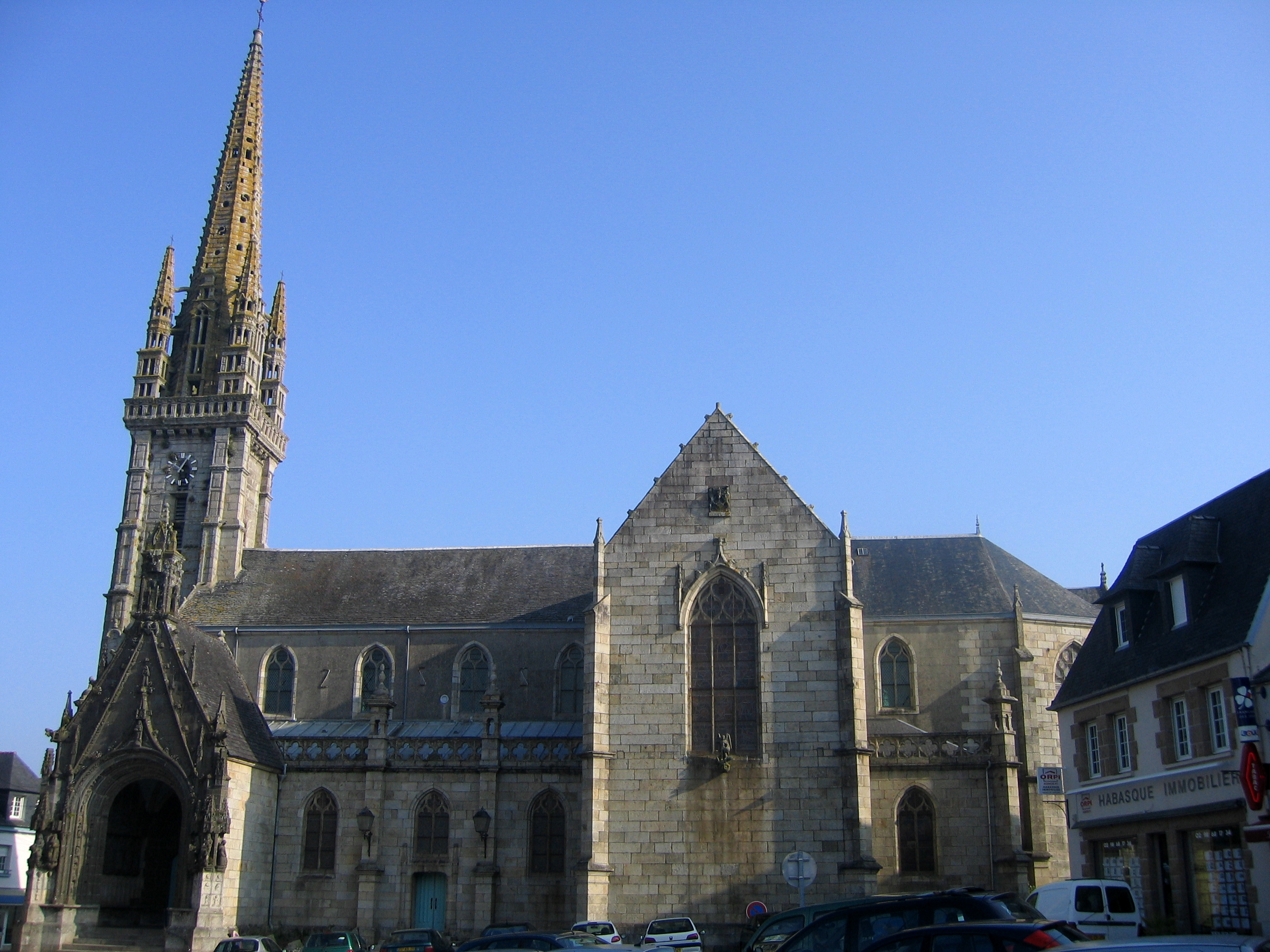 Vue de l'église de Landivisiau